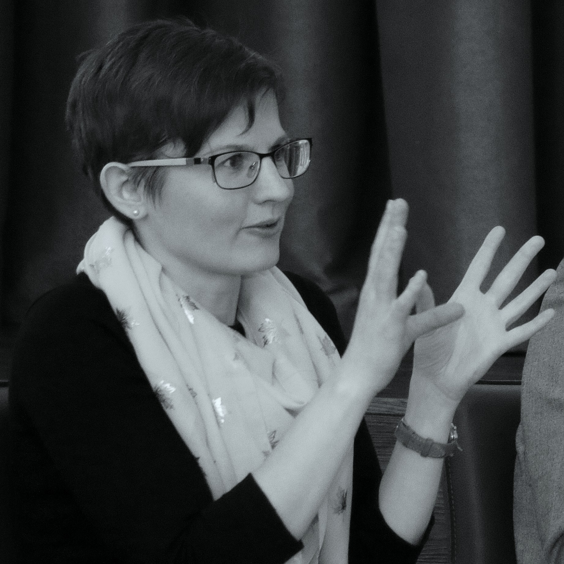 Liisa Puusepp (2017) (Foto: Piret Räni)